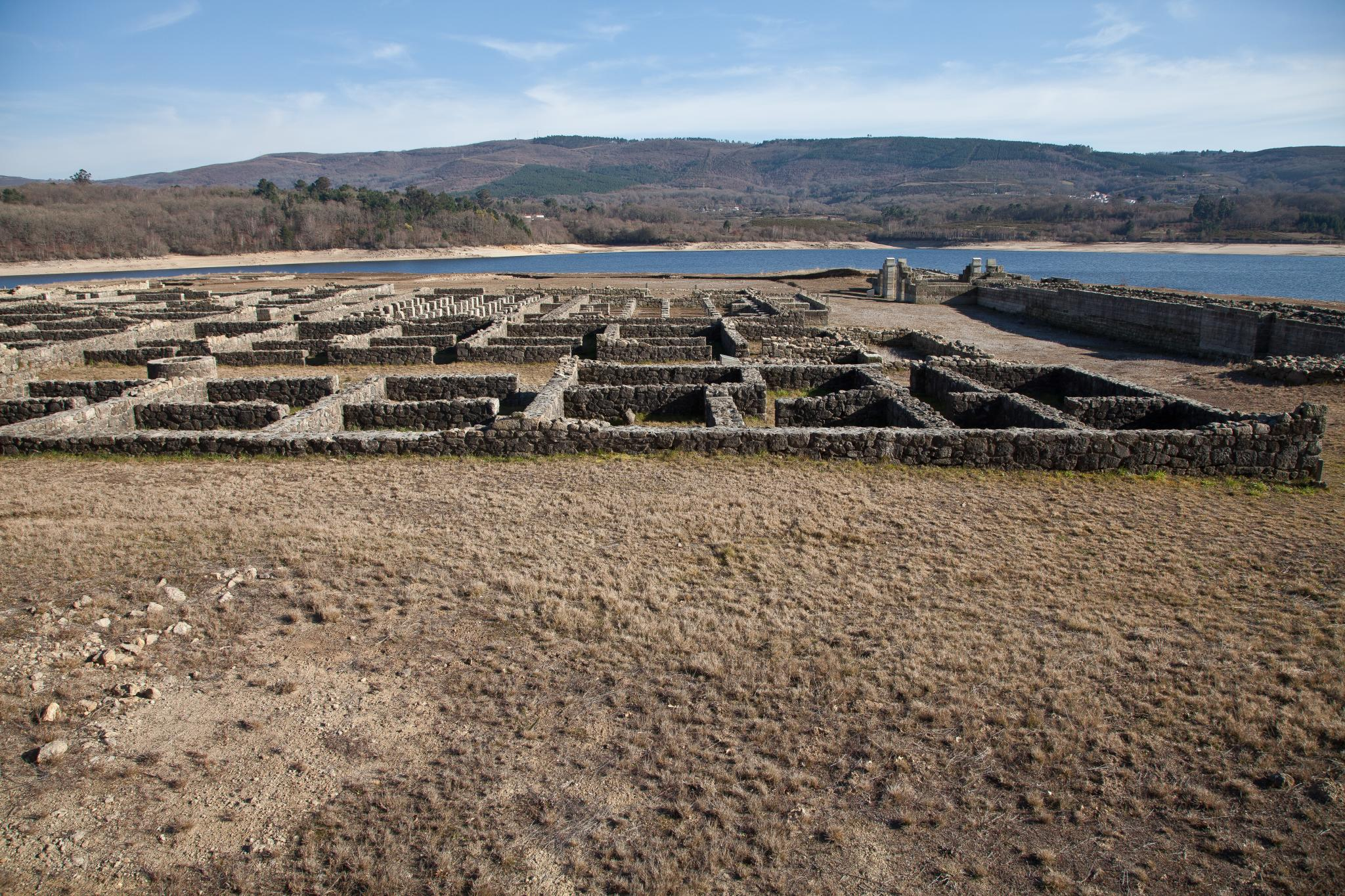 Strigia. 1º barracón da tropa. Aquis Querquenis. En primeiro termo o 1º barracón da tropa. Detrás os horrea e hostital (valetudinarium). A dereita da imaxe, muralla e porta decumana ao fondo. Galicia (España)